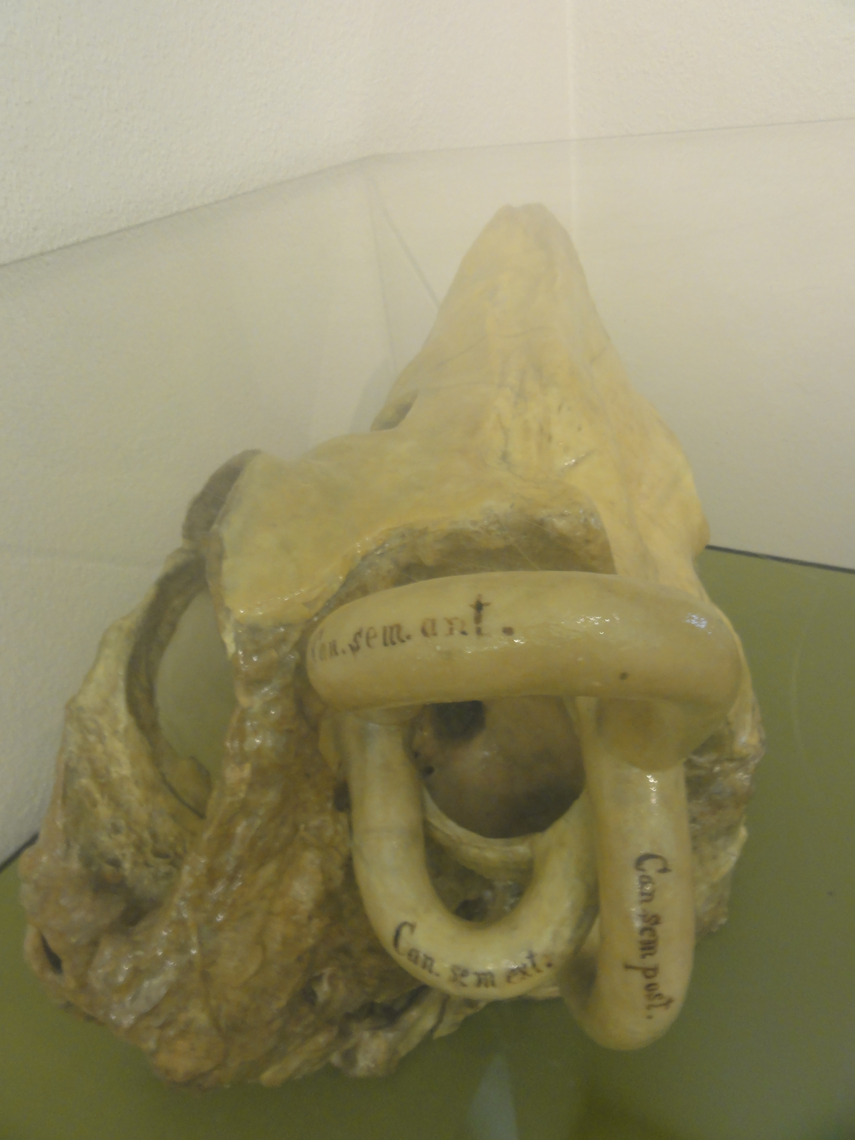 Basel — Anatomisches Museum der Universität